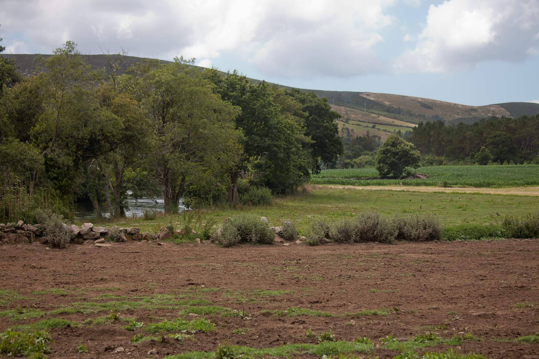 Ponte Olveira (ribeira da esquerda e fondo) e Olveiroa, lugares da parroquia de Olveiroa, Dumbría, Galiza